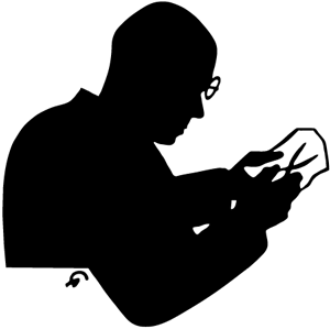 Портрет В.В. Гельмерсена работы В.А. Свитальского, Соловки, 1932